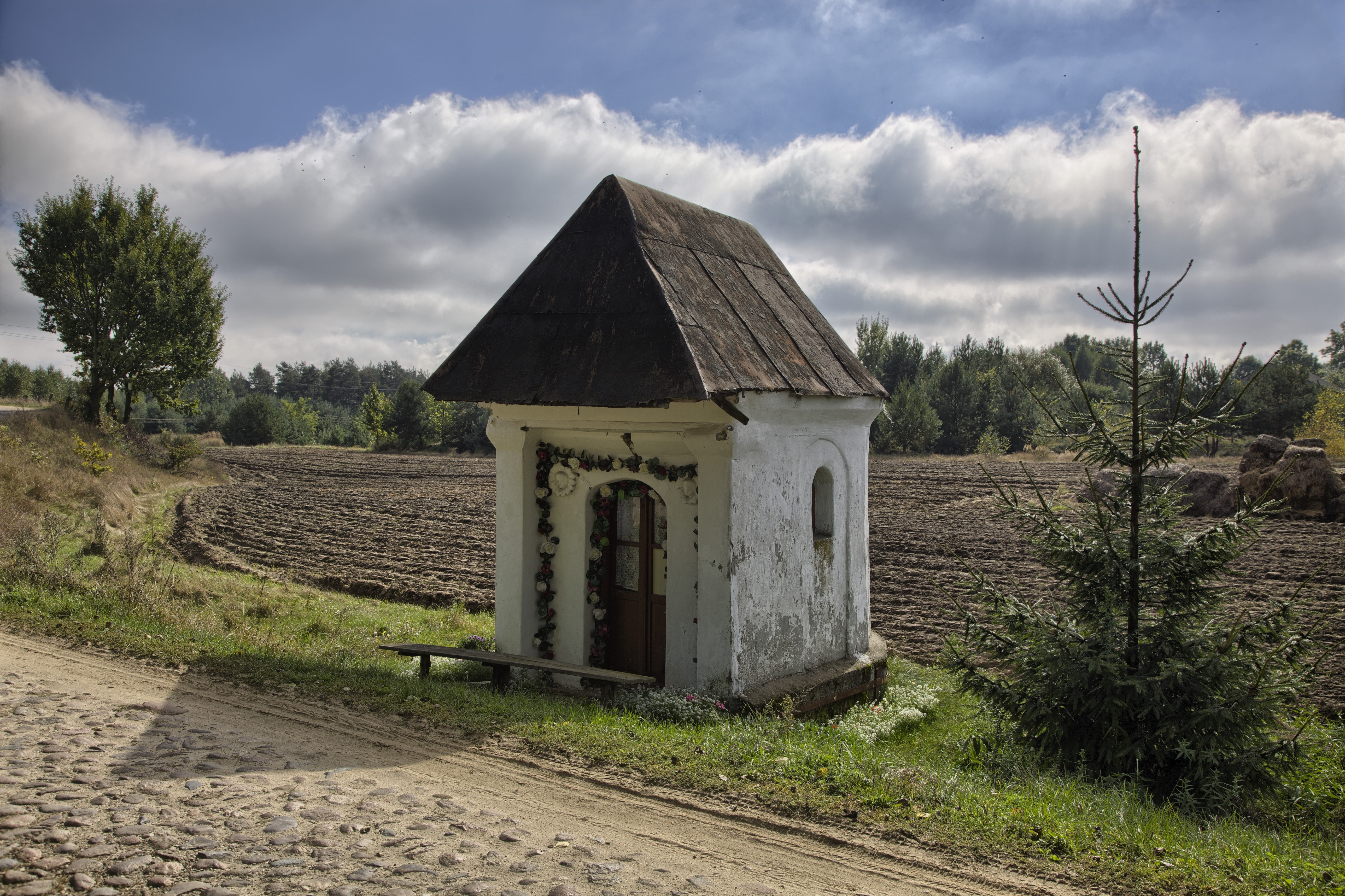 Osina Mała (przy przejeździe kolejowym), kapliczka przydrożna, XVII/XVIII